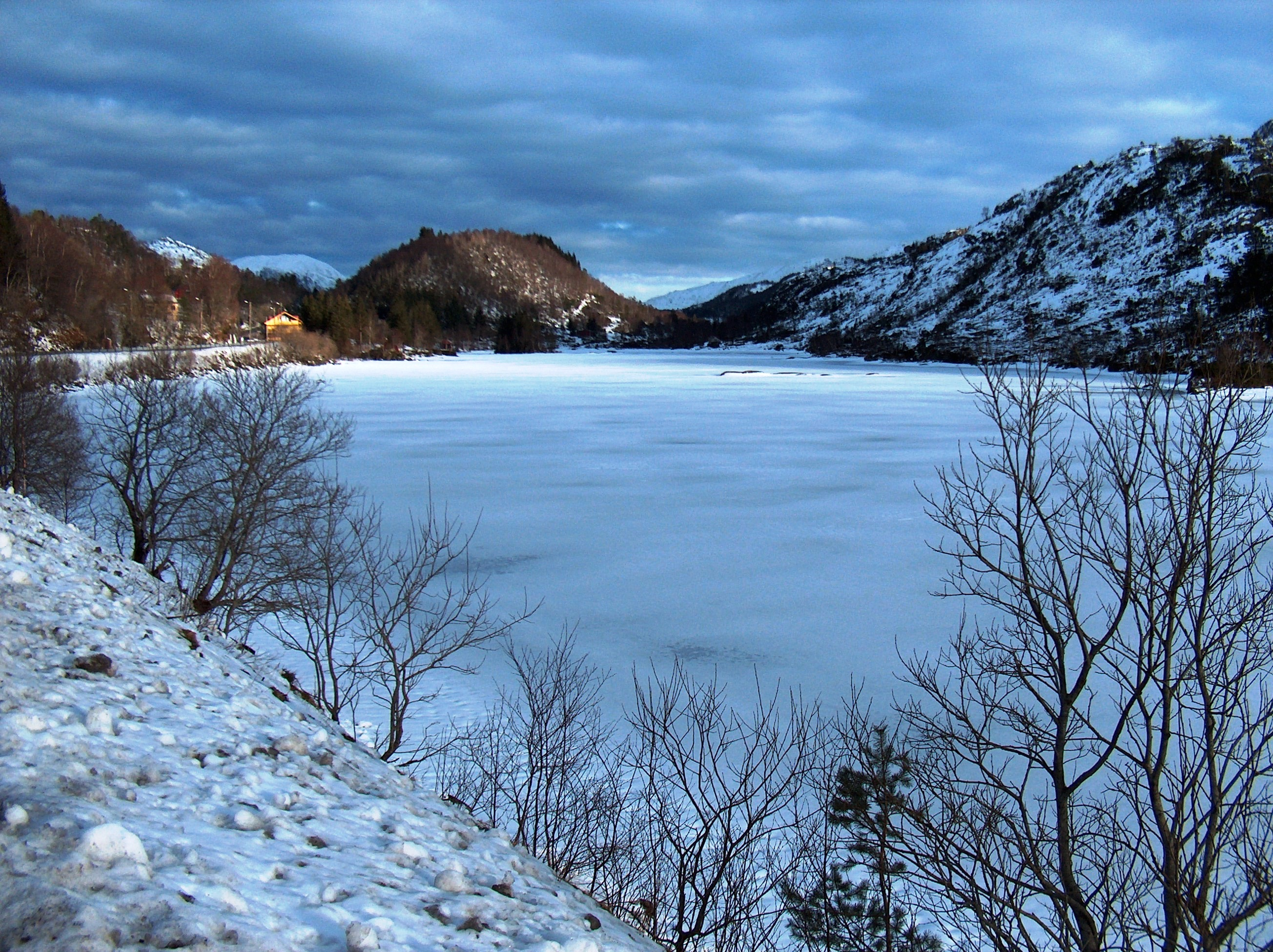 Langavatnet Gullbotn